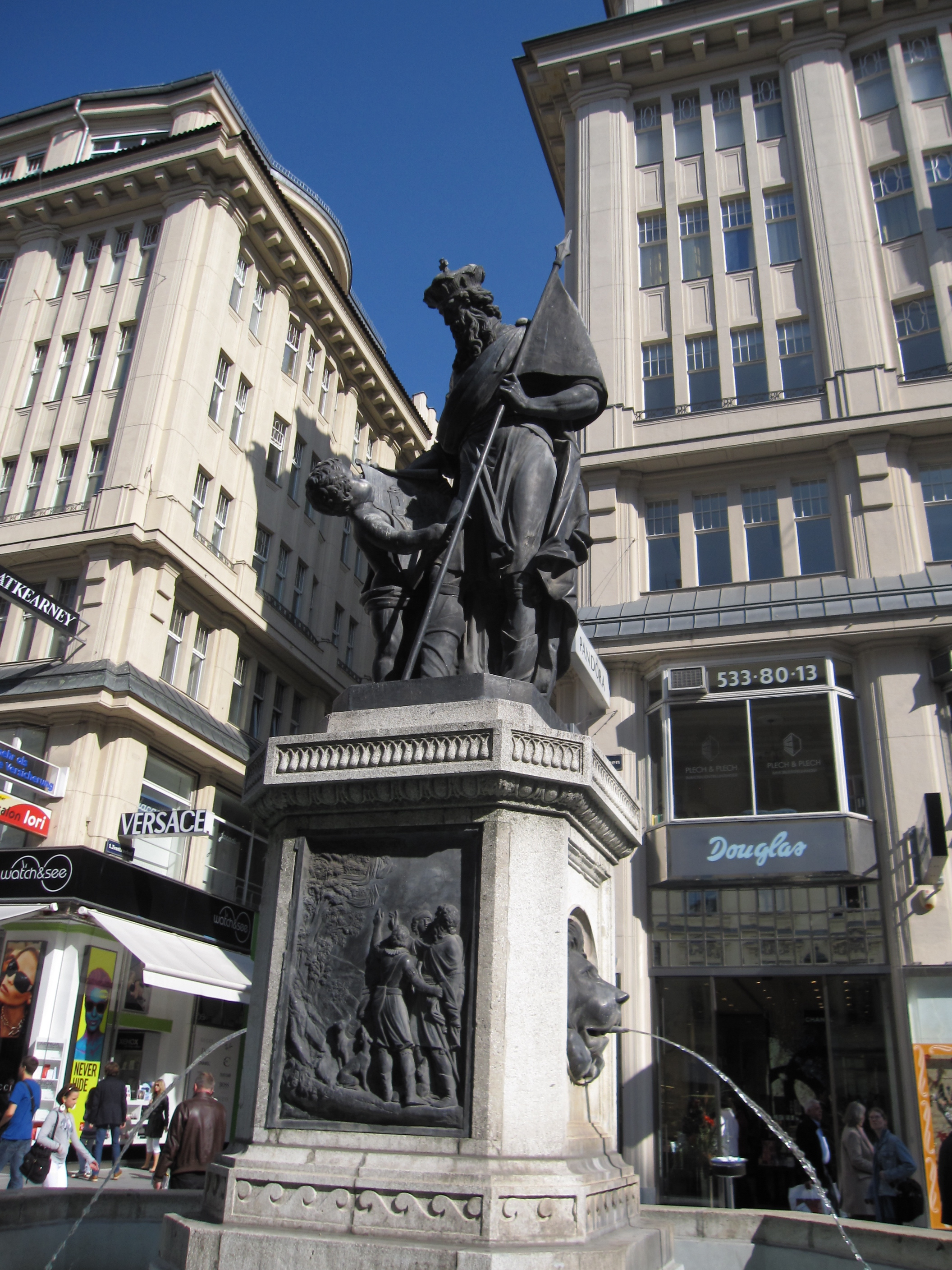 Leopoldsbrunnen (Vienna)